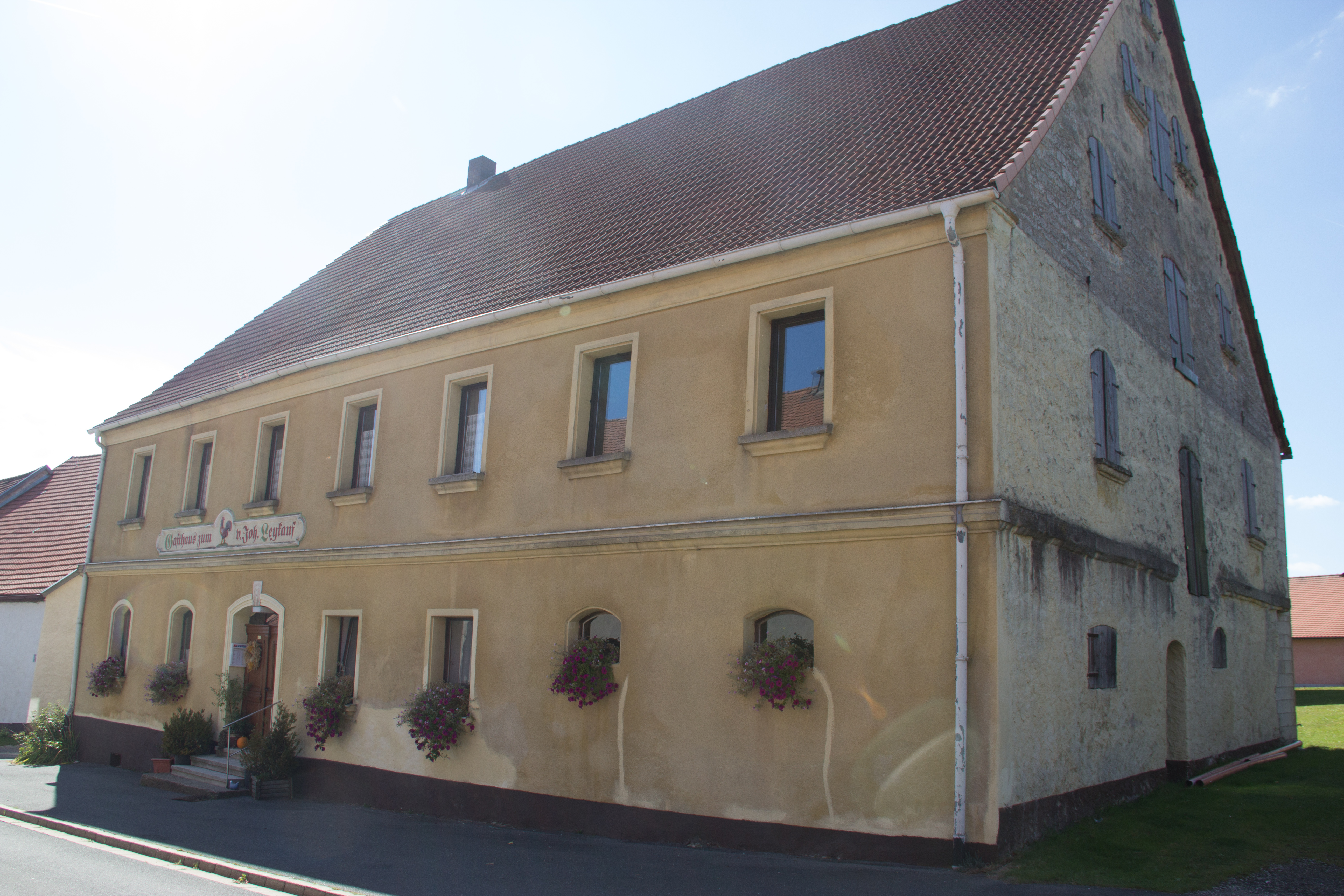 Gasthof Roter Hahn